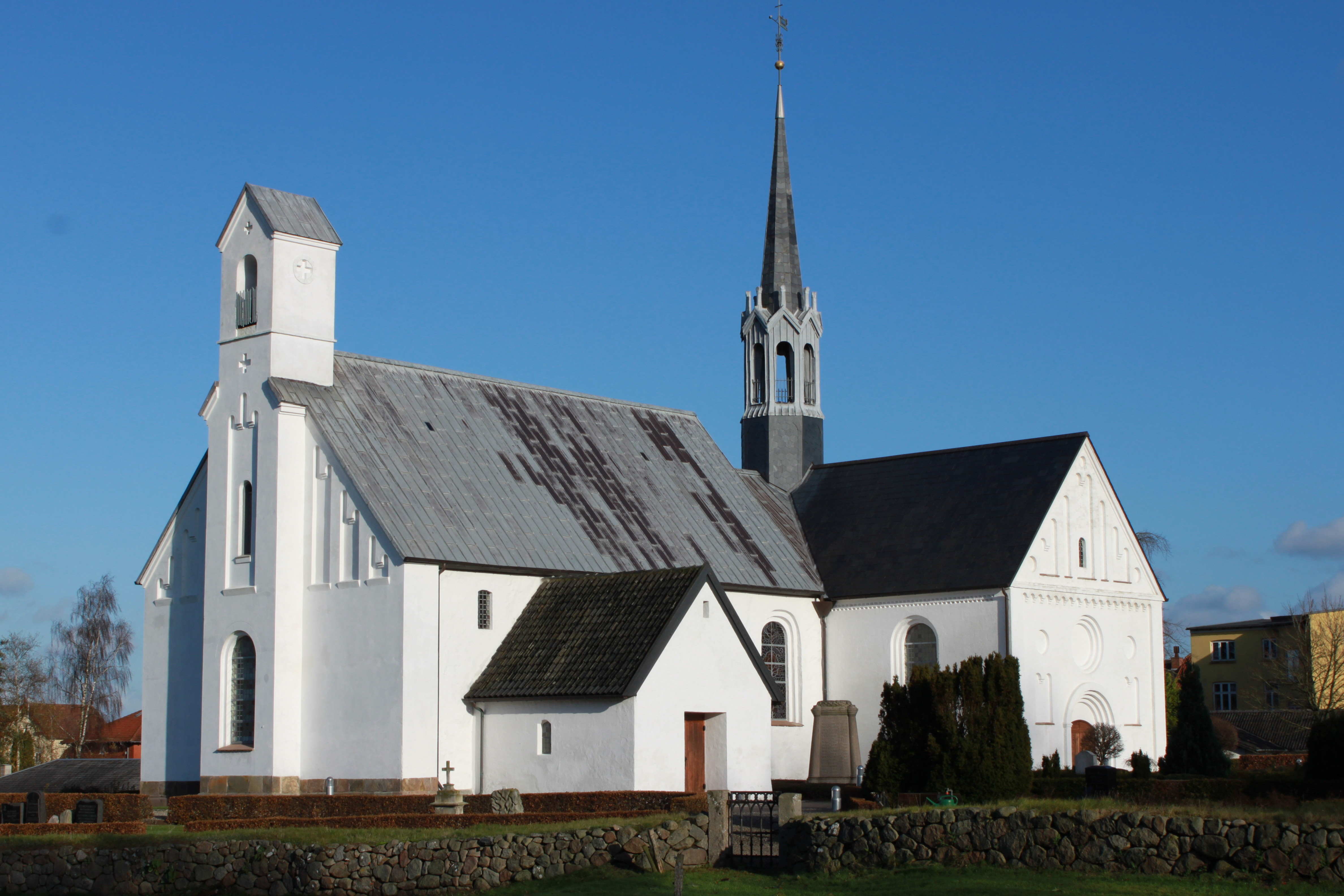 Skodborg Kirke